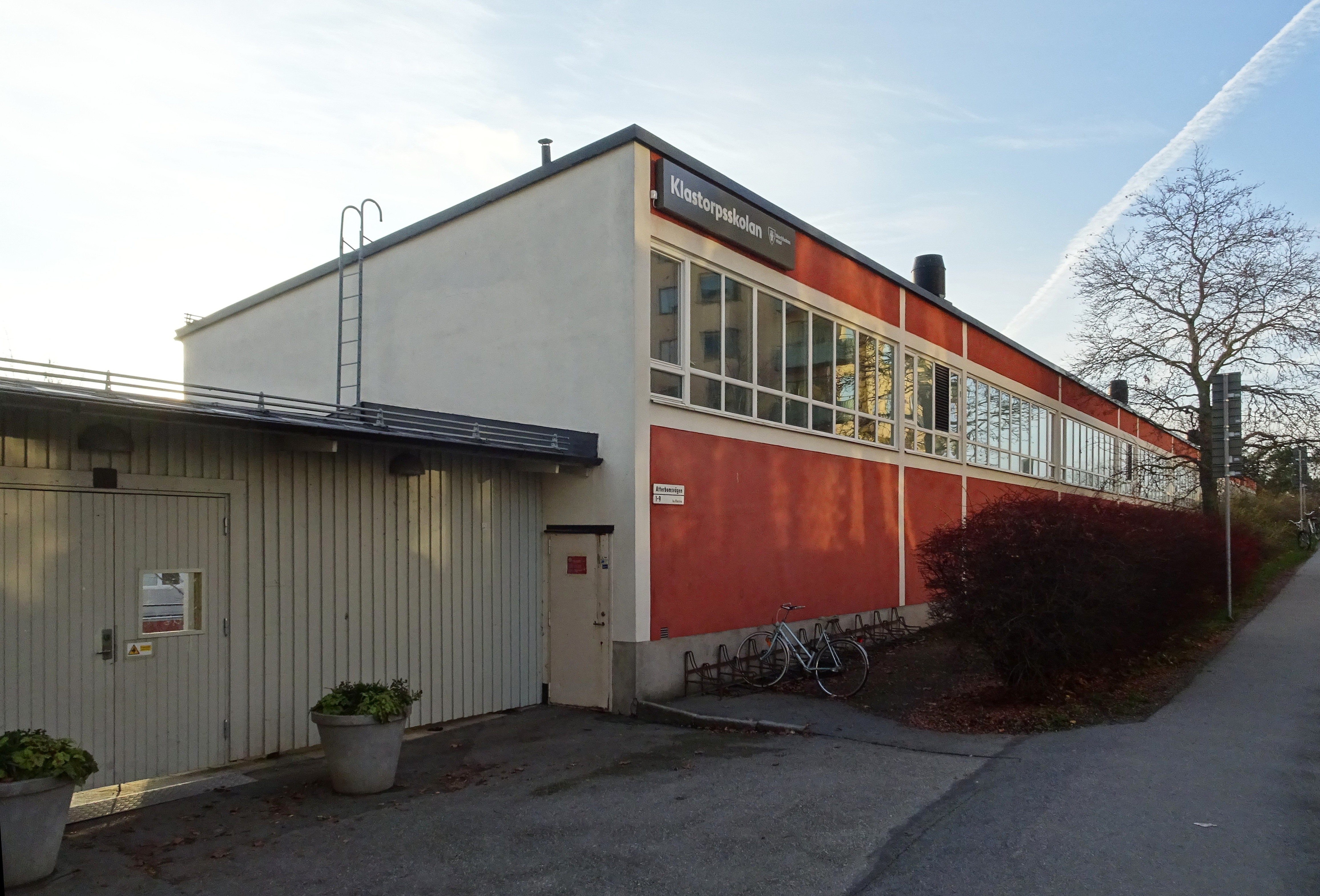 Klastorpsskolan, Fredhäll, arkitekt Curt Björklund, byggd 1957 - 1969